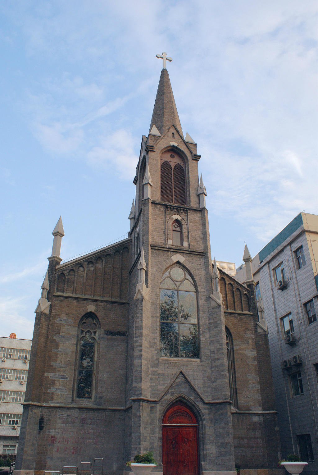 中文（中国大陆）: 天主教圣母圣衣堂